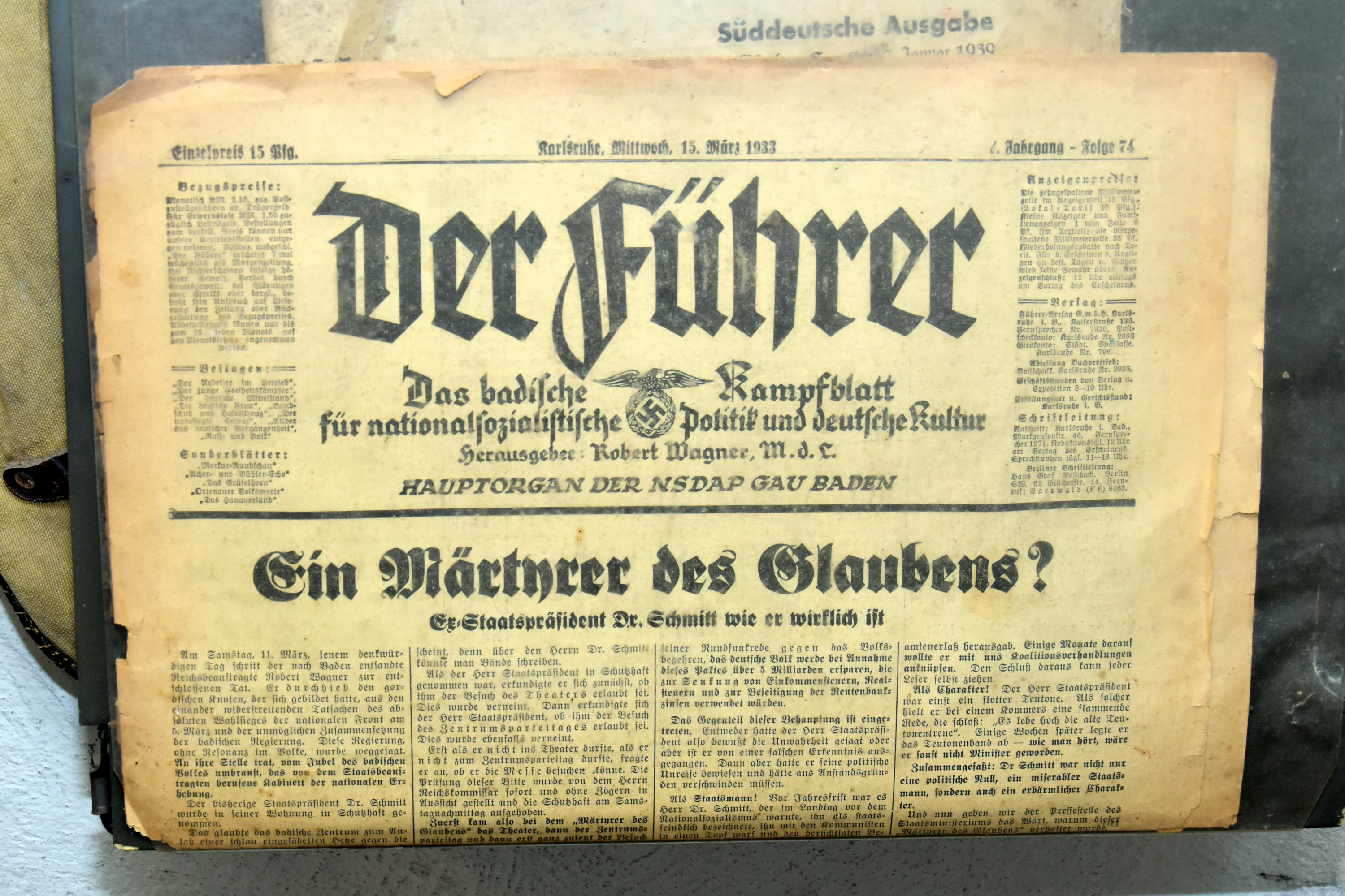 Der Führer, Ausgabe 15. März 1933, Bunkermuseum Dettenheim, Sanitäts-Regelbau-32, errichtet durch die Organisation Todt im Jahr 1939, unbenutzt bis Kriegsende 1945